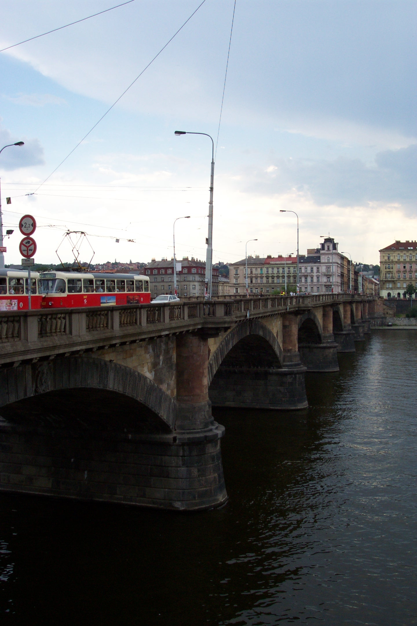 Palackého most v Praze - Palackého most bridge in Prague